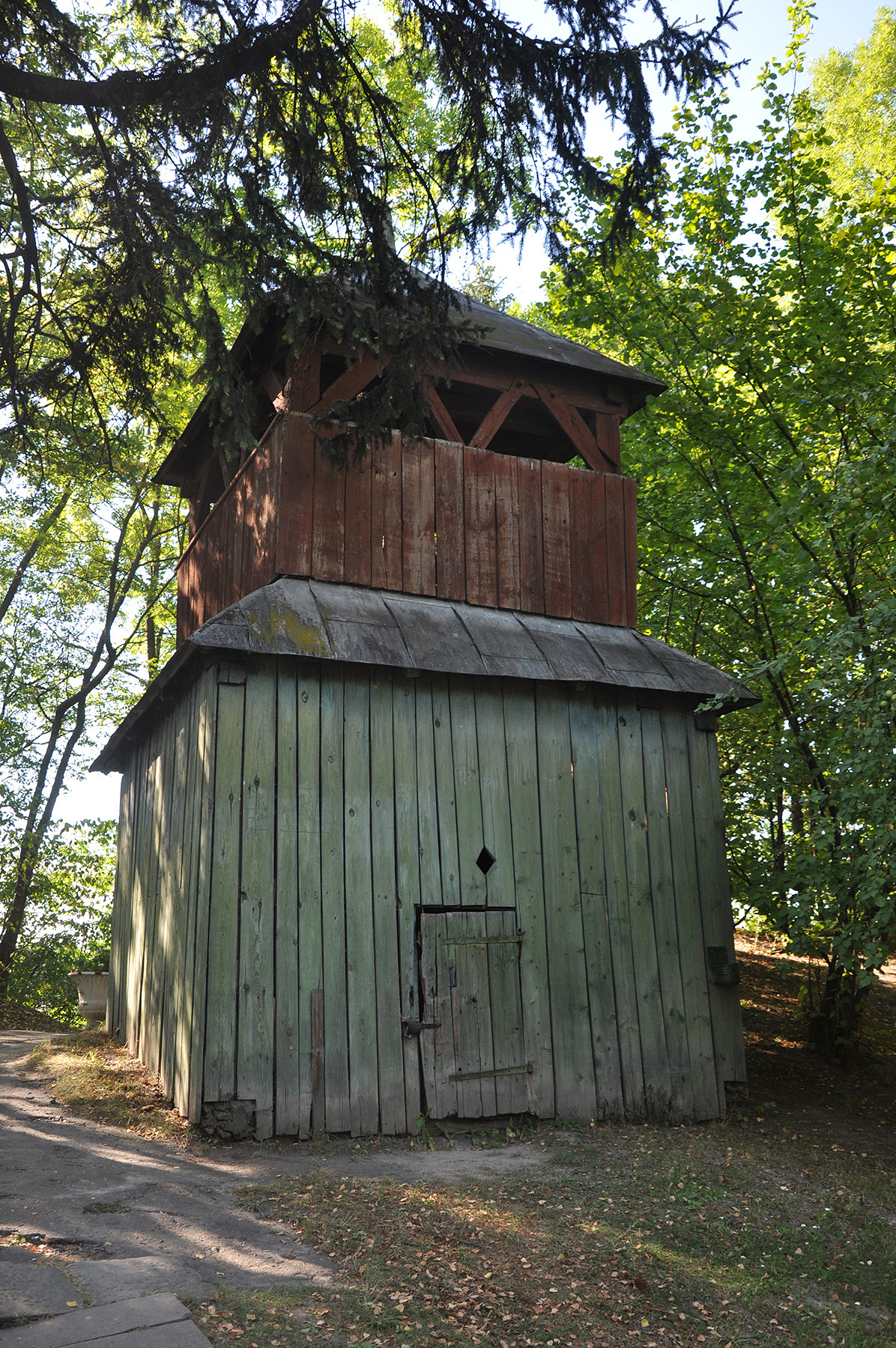 Дзвіниця церкви Св. Онуфрія (дер.), Буськ, передм. Воляни